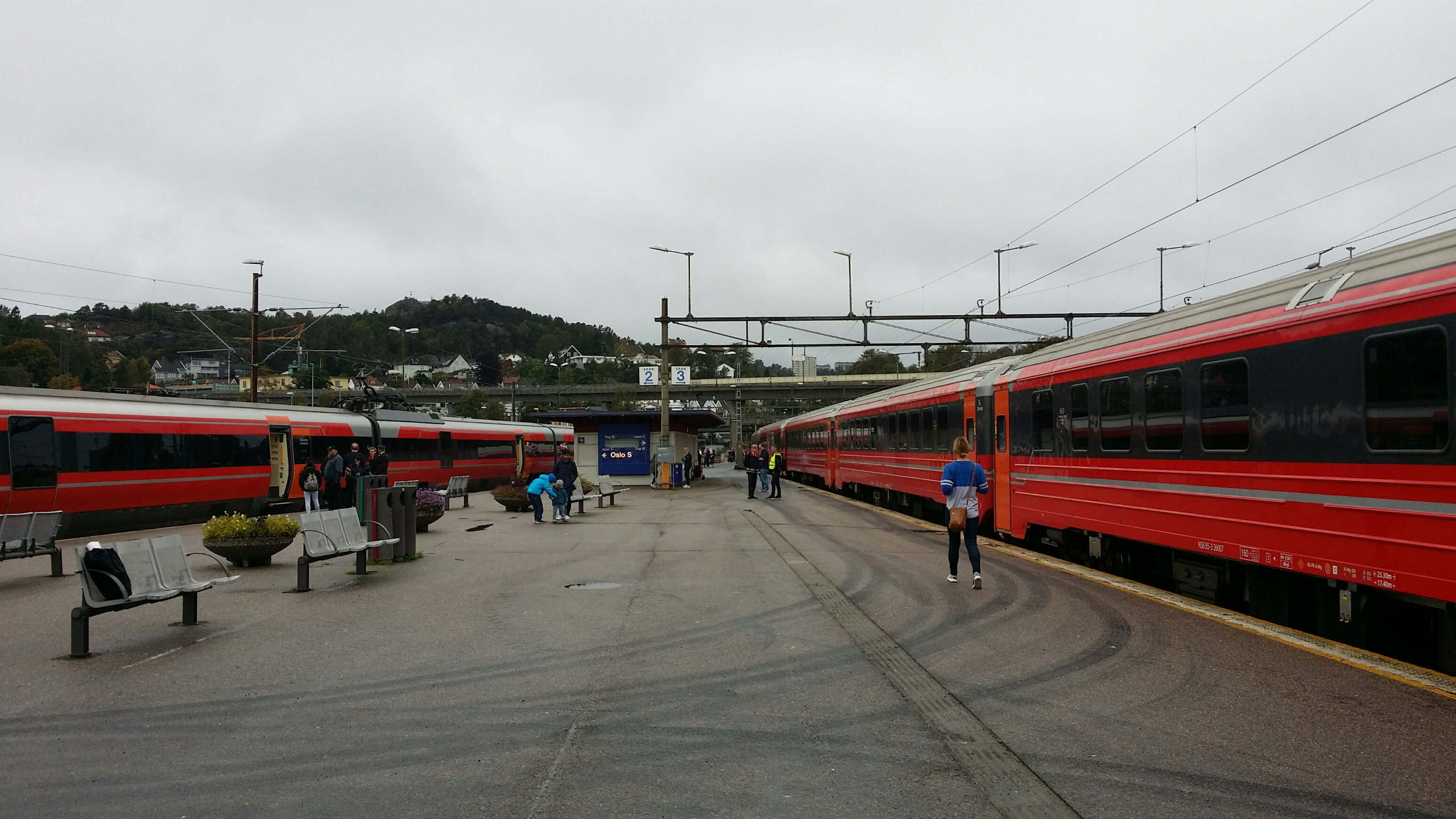 Kristiiansand stasjon, perrong og tog.